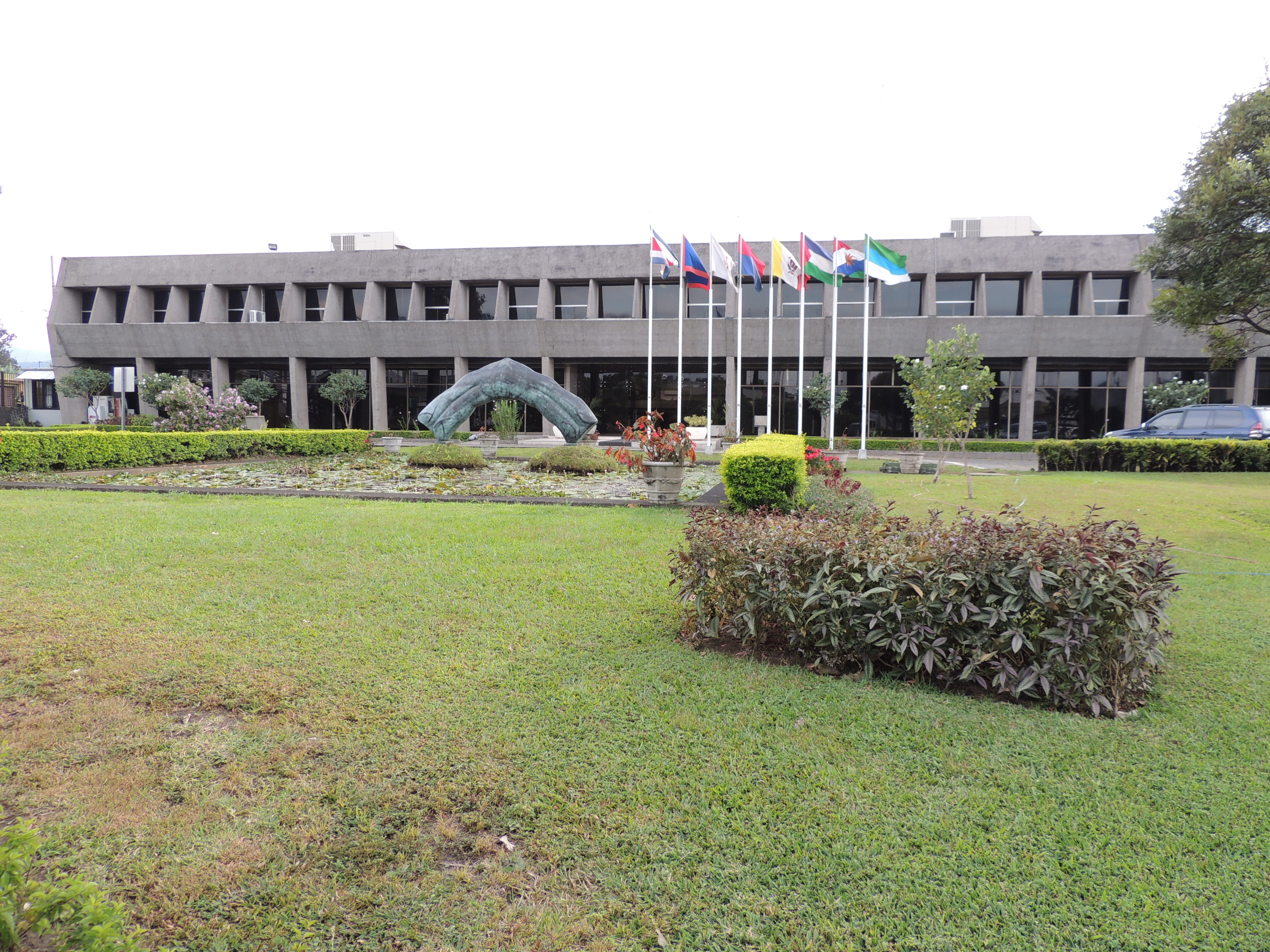 La Casa Presidencial de Costa Rica